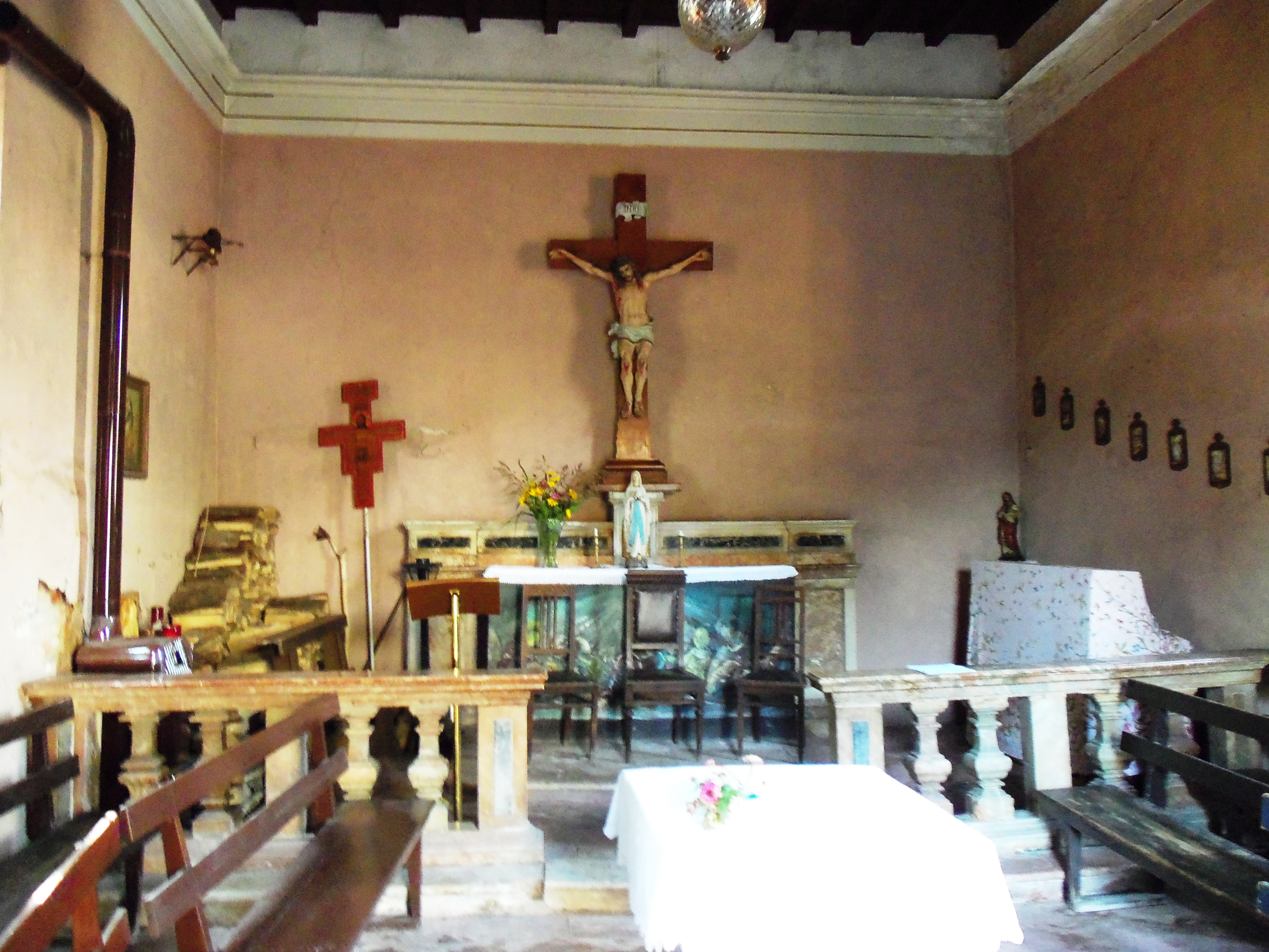 Il piccolo oratorio del XVII secolo alla cascina Campazzo